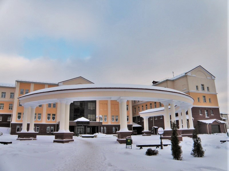 Здание БИПа г.Гродно